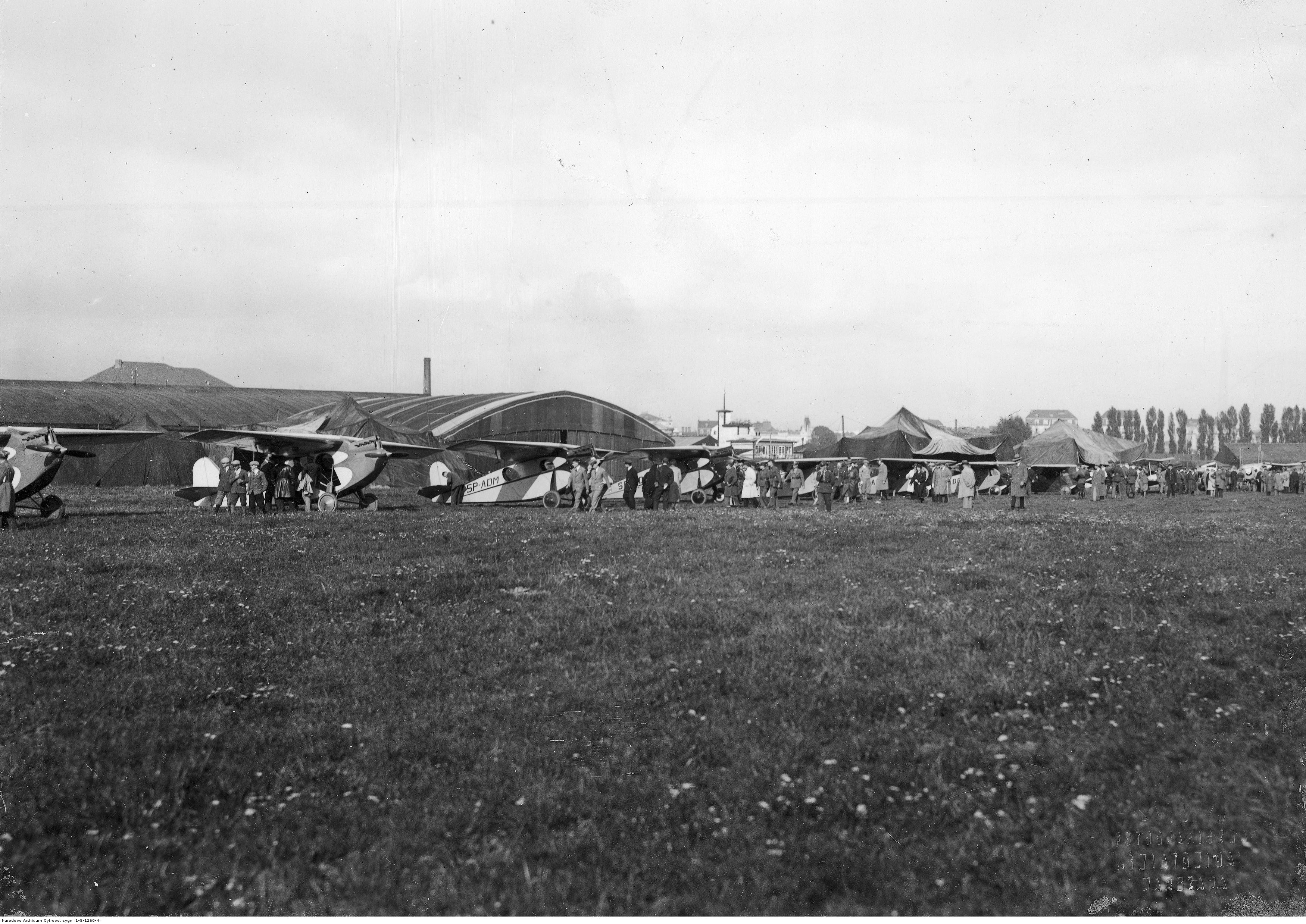 Samoloty na lotnisku podczas III Krajowego Konkursu Awionetek w Warszawie. Od lewej stoją 4 samoloty RWD-4, w tym SP-ADM.